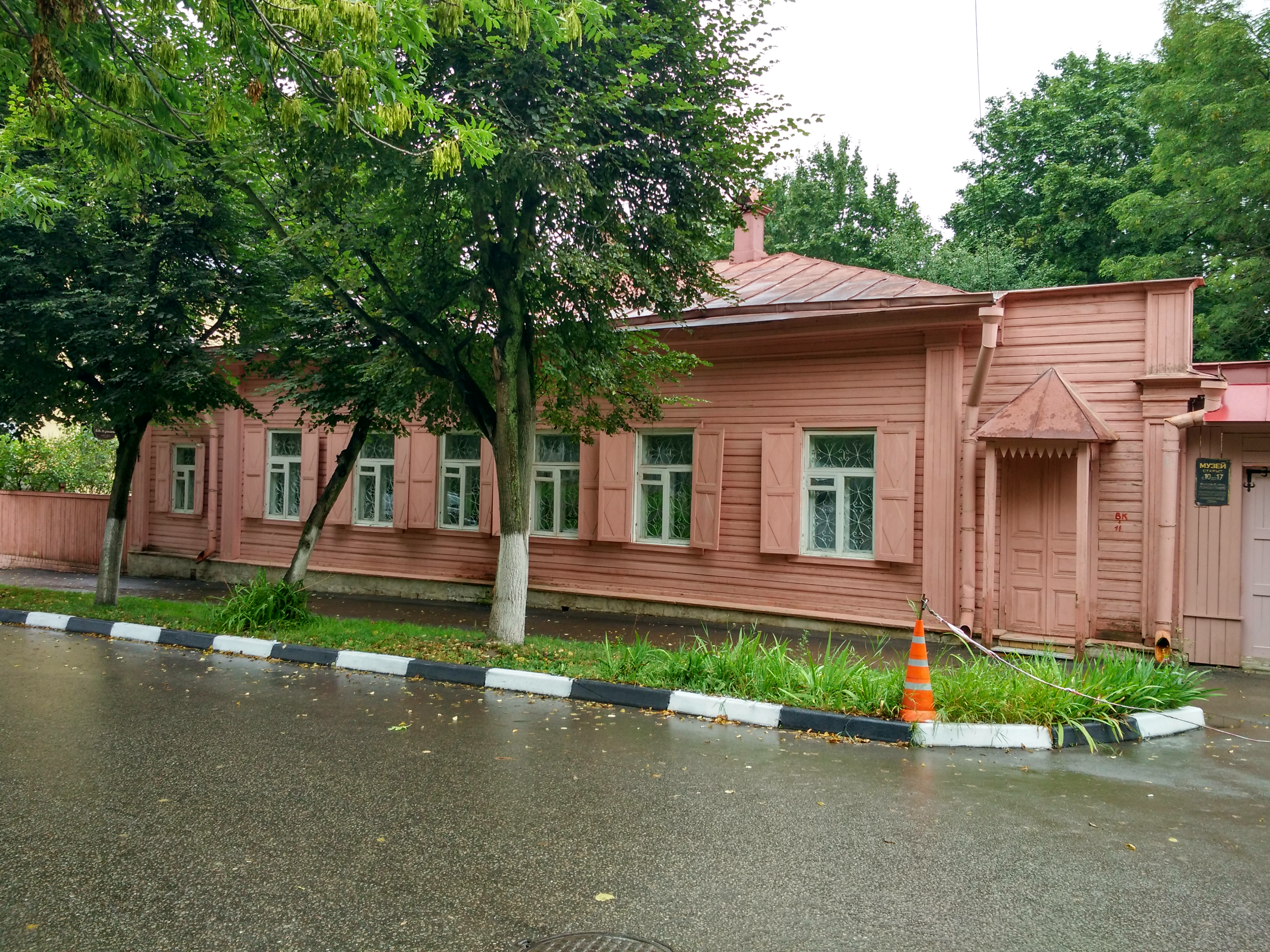 Главный дом усадьбы Смидовичей: улица Гоголевская, 82, Тула, Тульская область